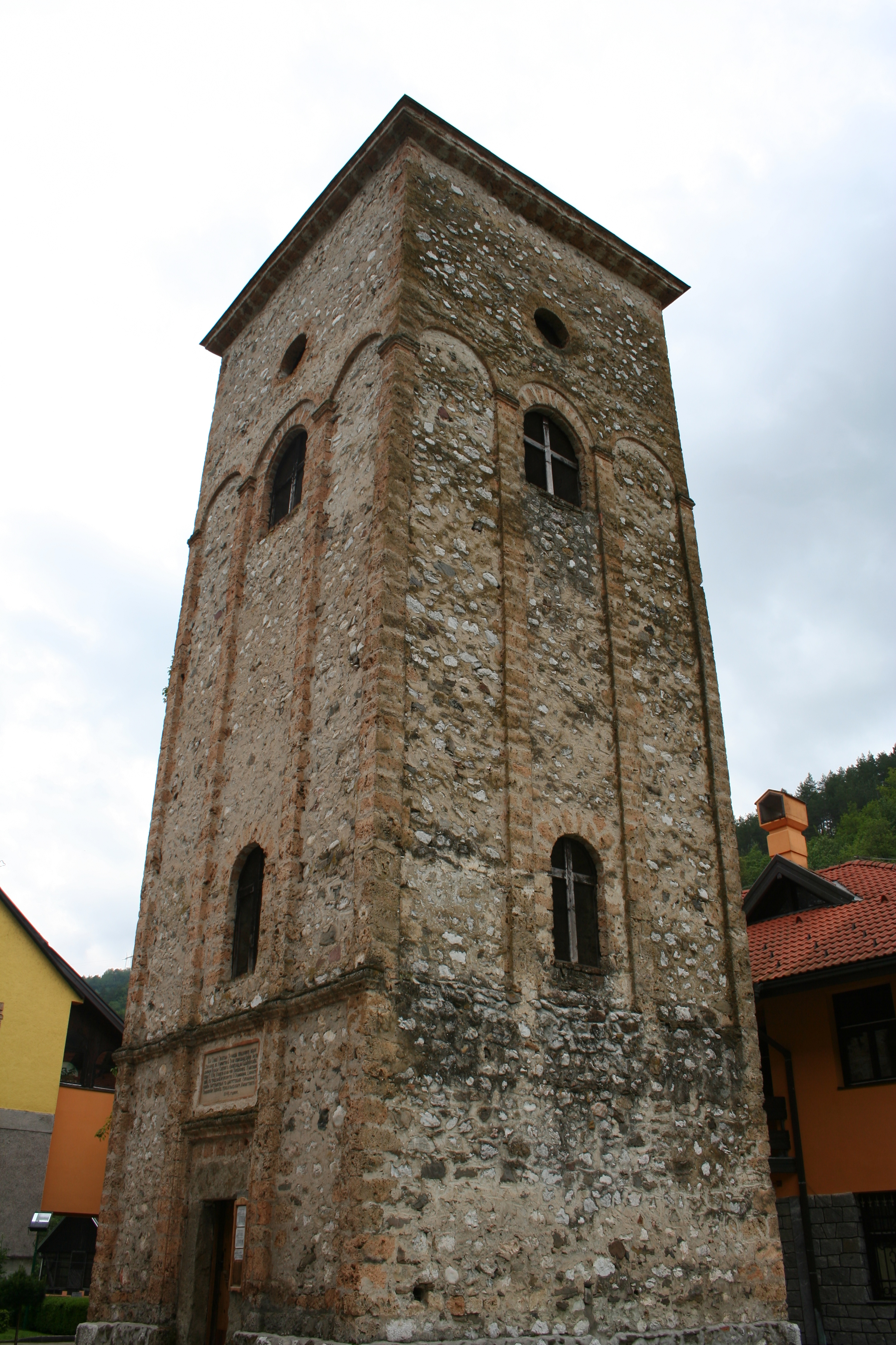 Manastir Rača, maj 2017.